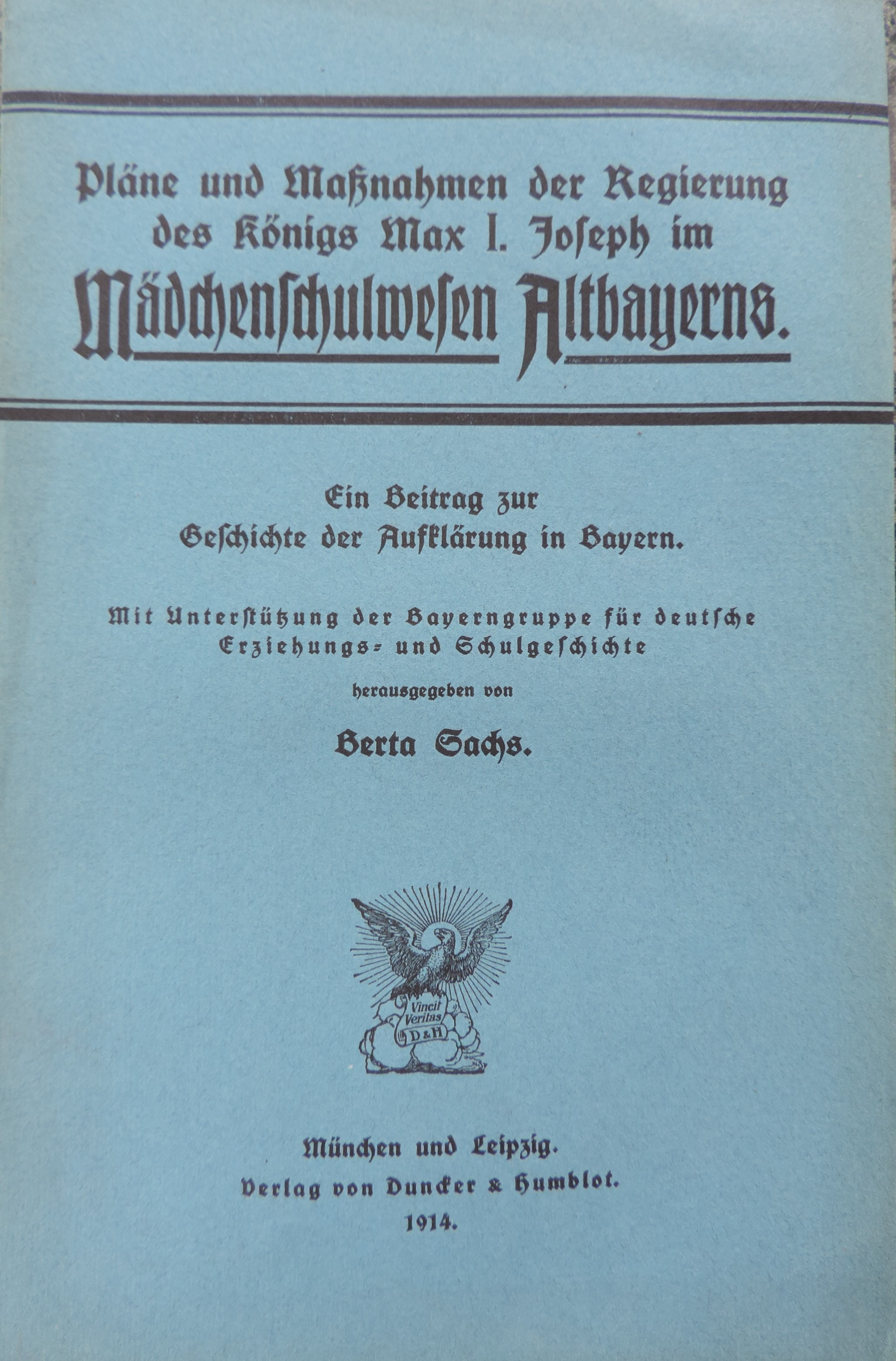 Dissertation von Berta Sach